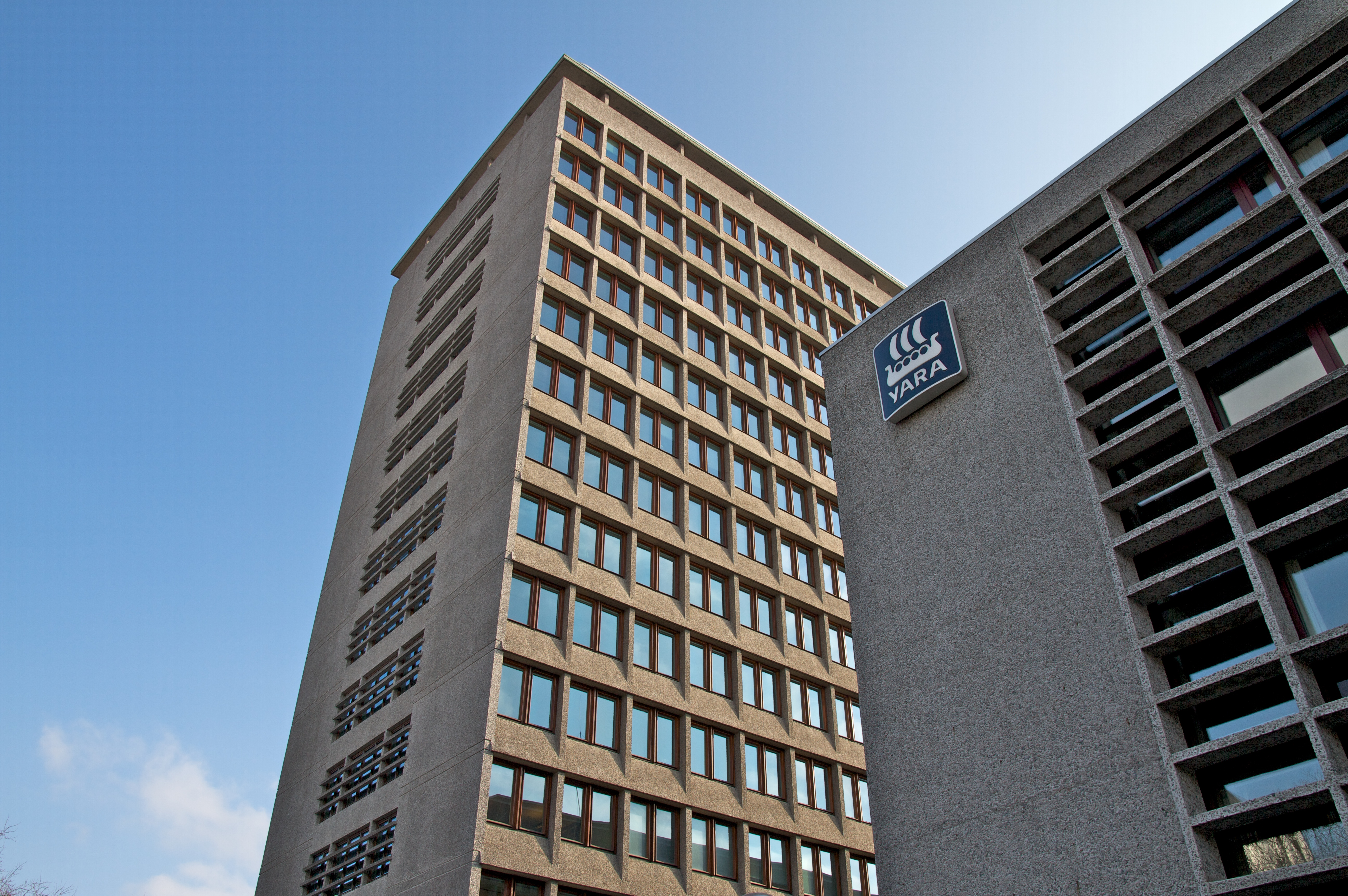 Bygdøy allé 2. Frogner i Oslo.